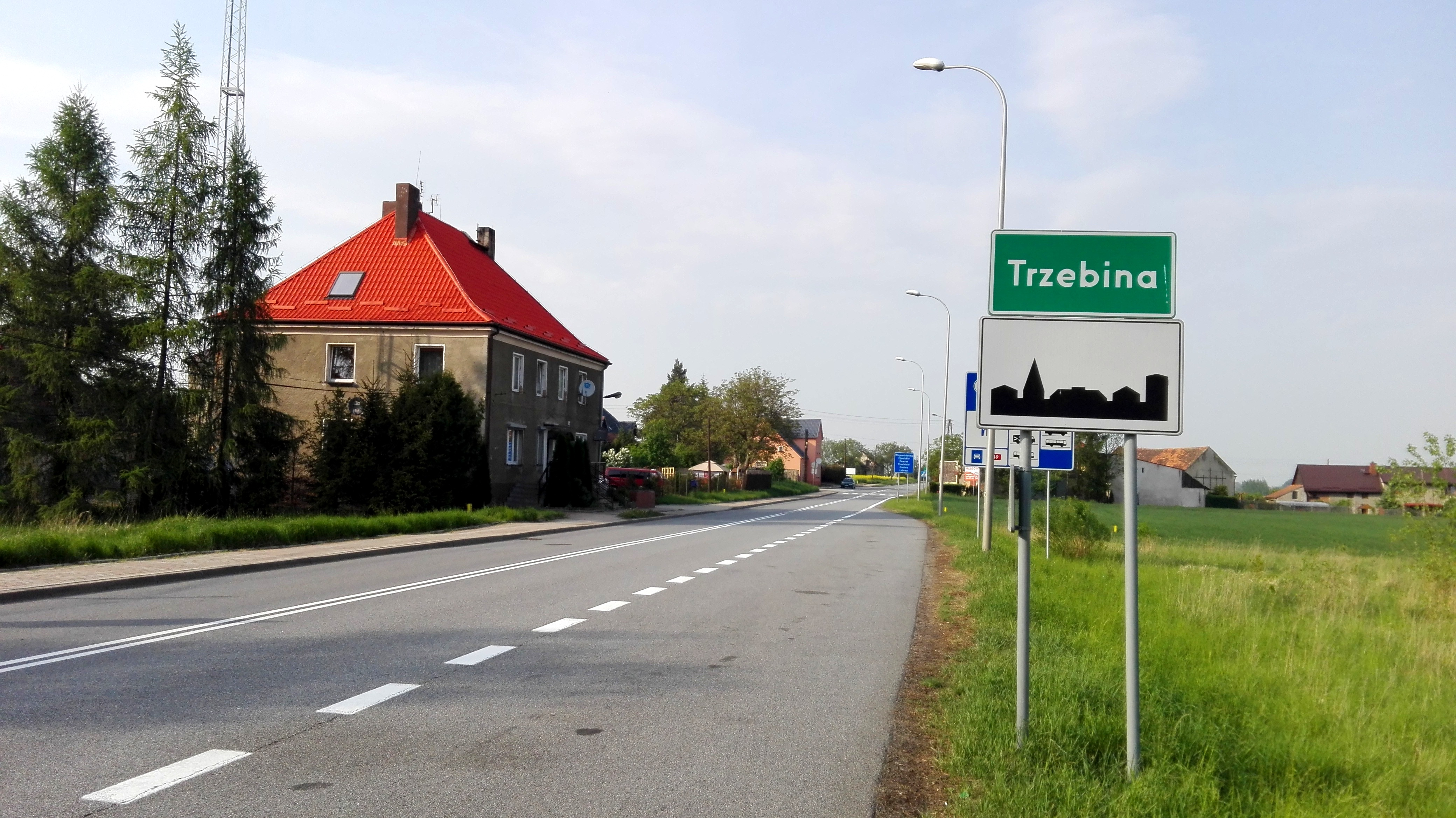 Trzebina, droga krajowa nr 41 (DK41). Odcinek drogi Trzebina - Prudnik, po lewo dawna Strażnica WOP/SG w Trzebinie